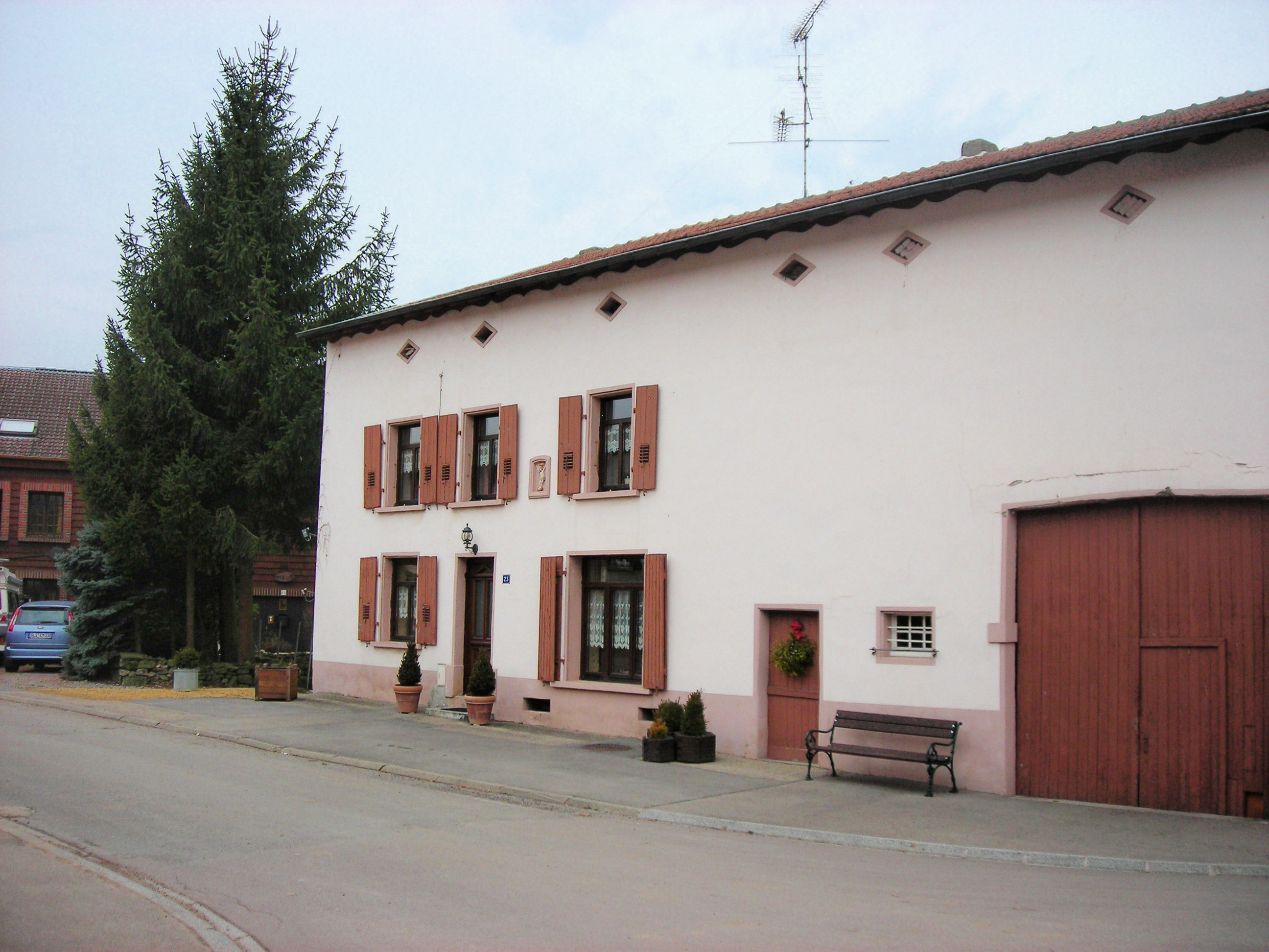 Maison lorraine à Berviller-en-Moselle (57 France)